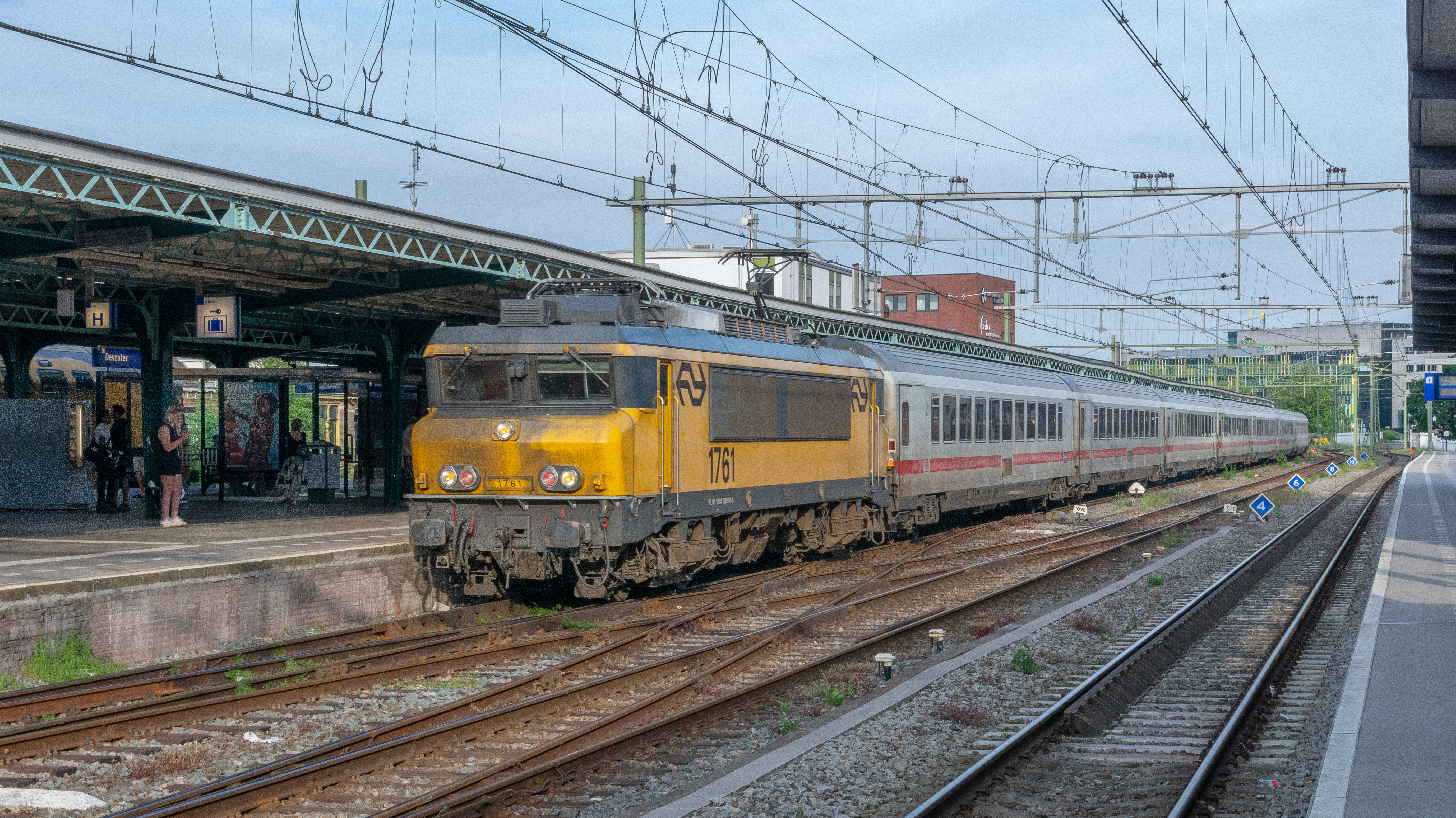 Aan het begin van de avond rijdt NSI 1761 met IC 142 Berlin Ostbahnhof-Amsterdam Centraal, het station van Deventer binnen.